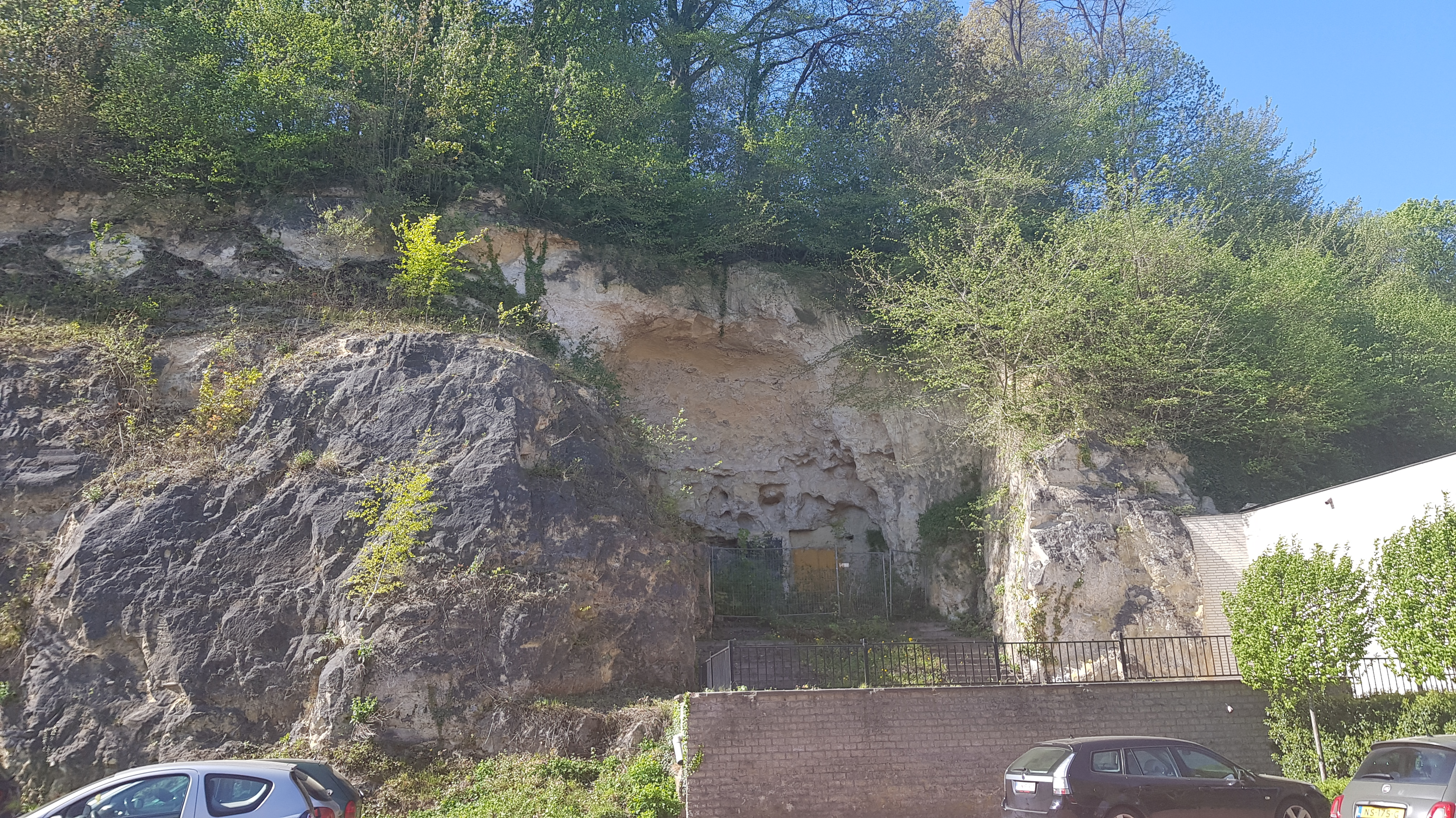 Plenkertgroeve, Valkenburg, Nederland